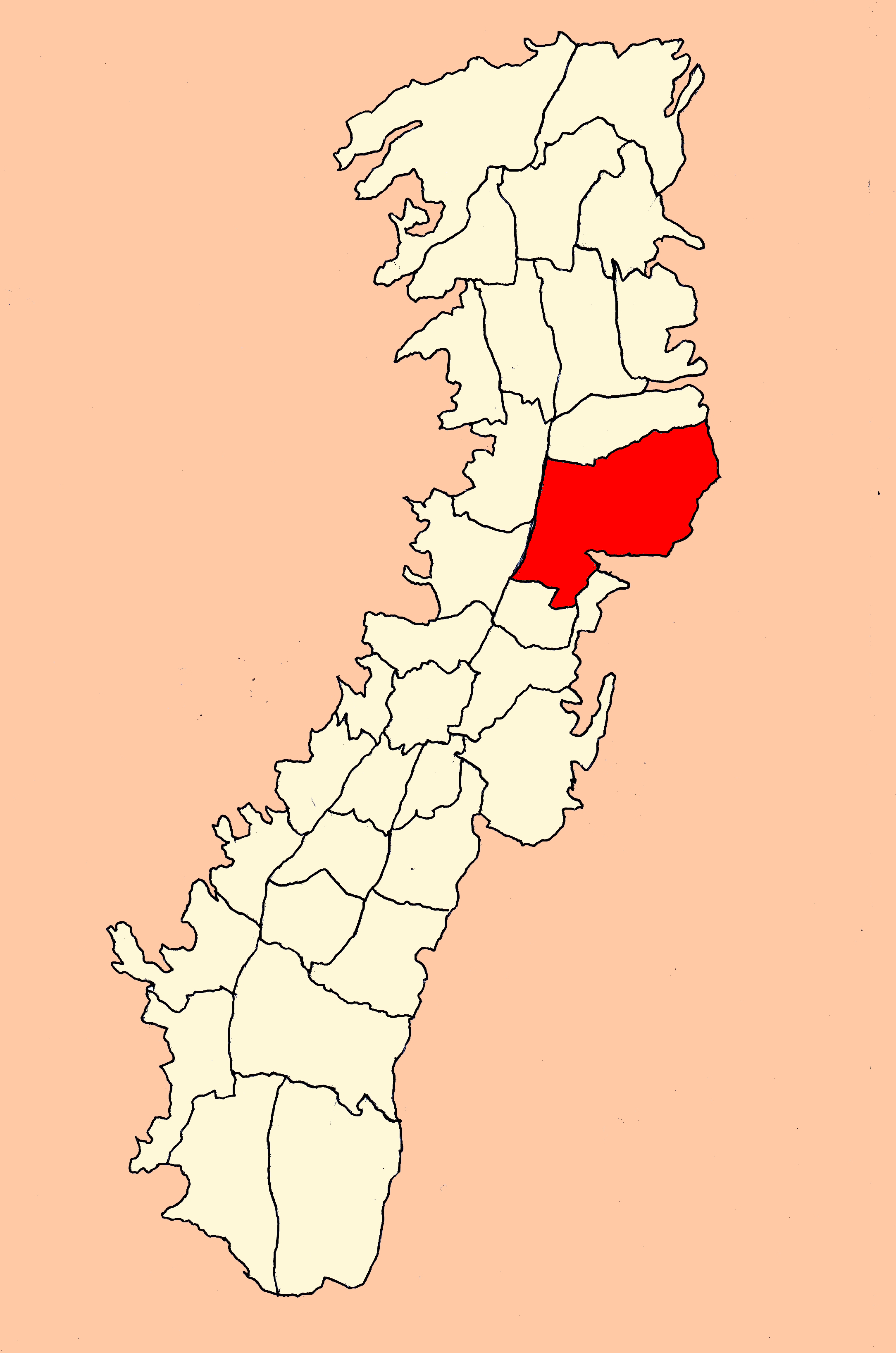 Parroquia Iñaquito (Quito, Ecuador)